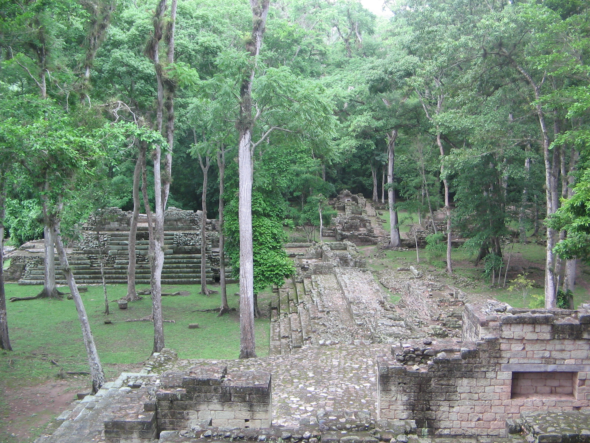 Ruinas de Copan foto tomada el dia 21-Jul-2007B